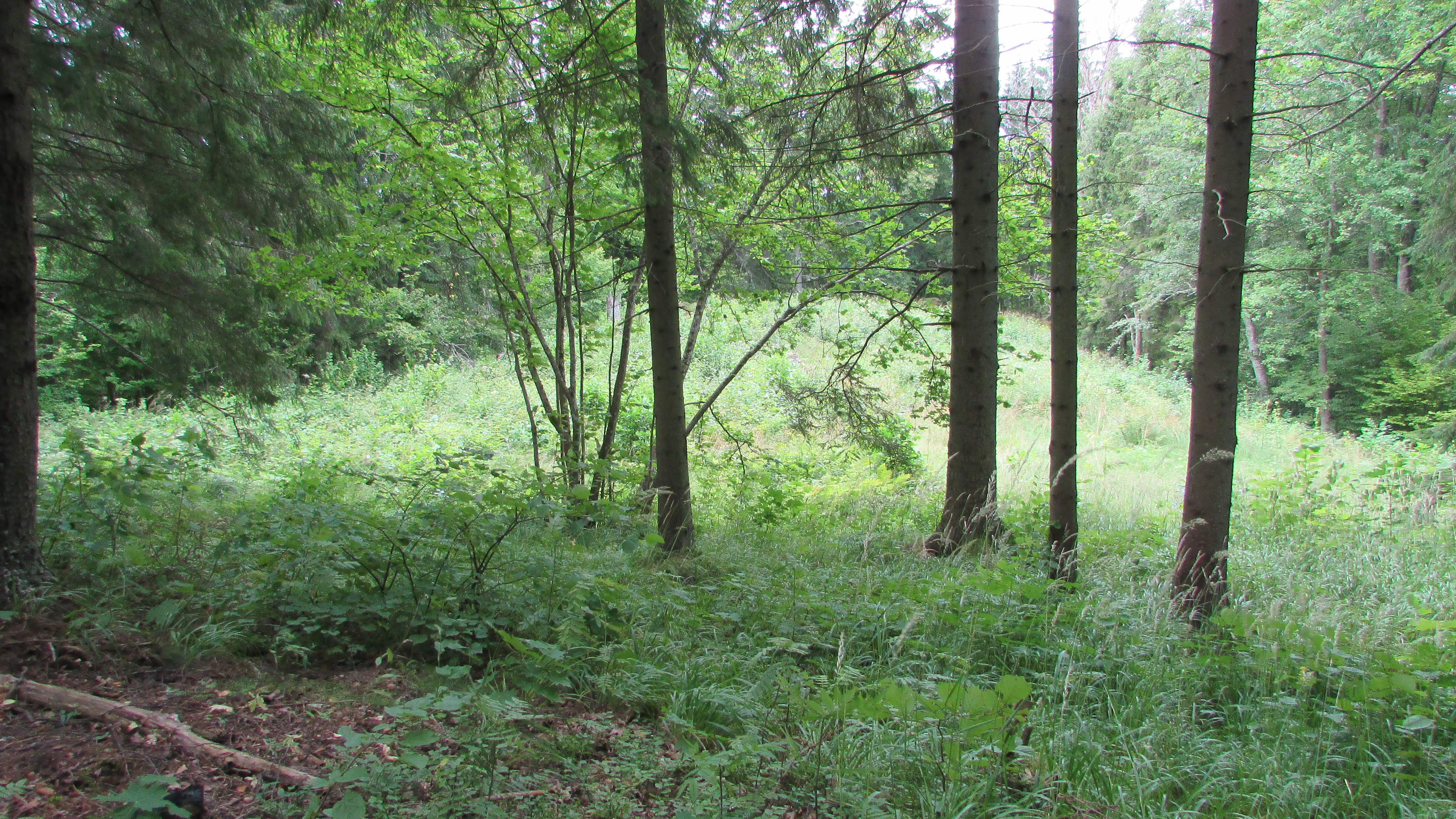 Puiša kalns - pilskalns, Puiškalnciems, Dundagas pagasts, Dundagas novads